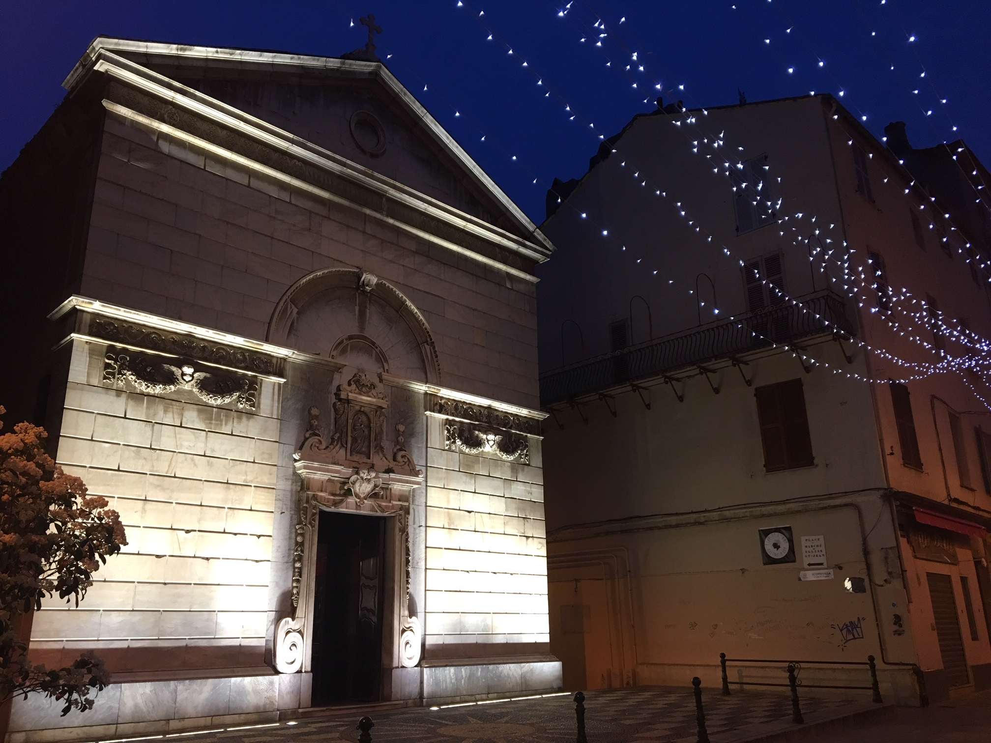 Oratoriu di A Cuncezziò, in Bastia, carrughju Napuleò